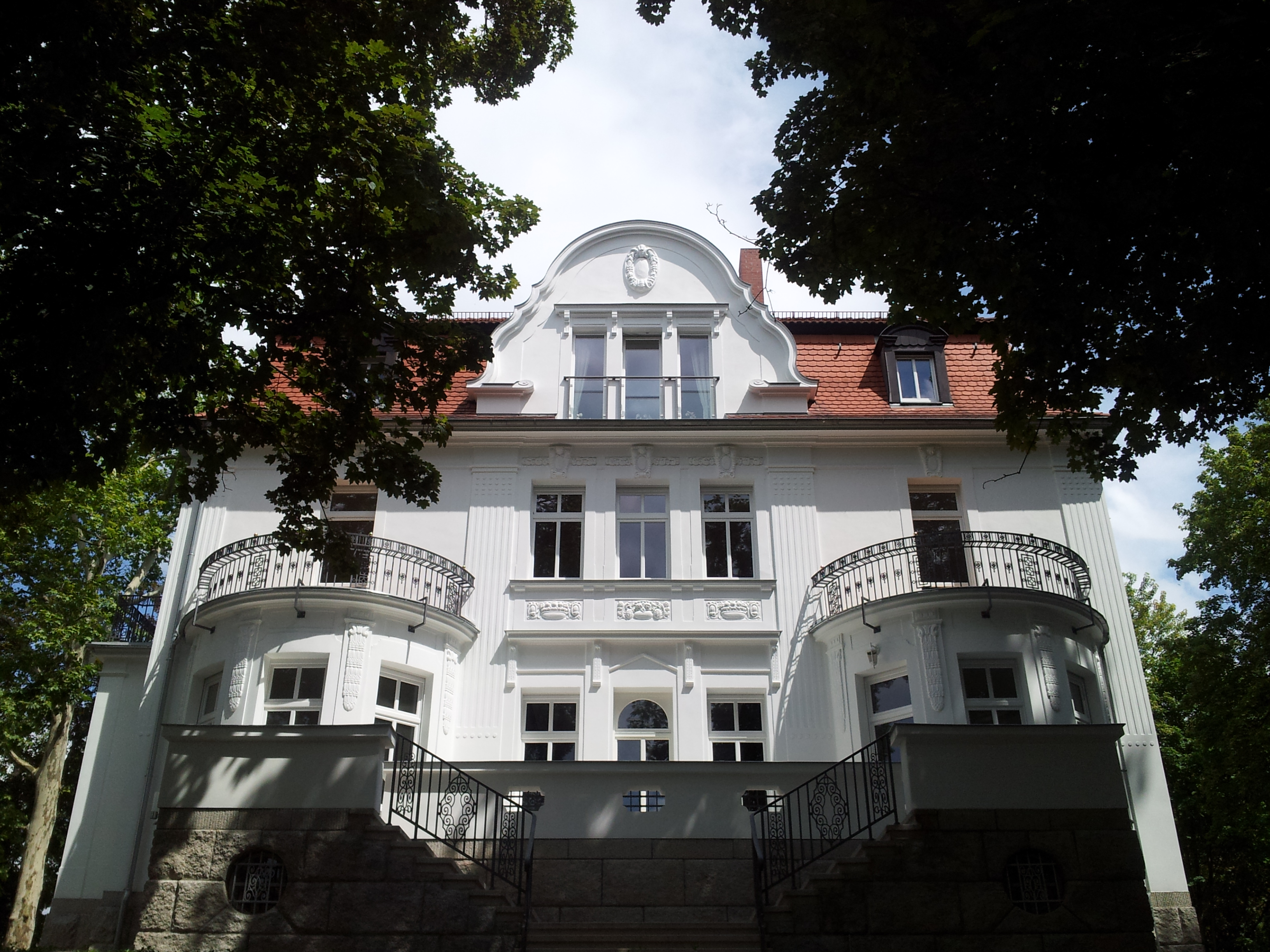 Westseite